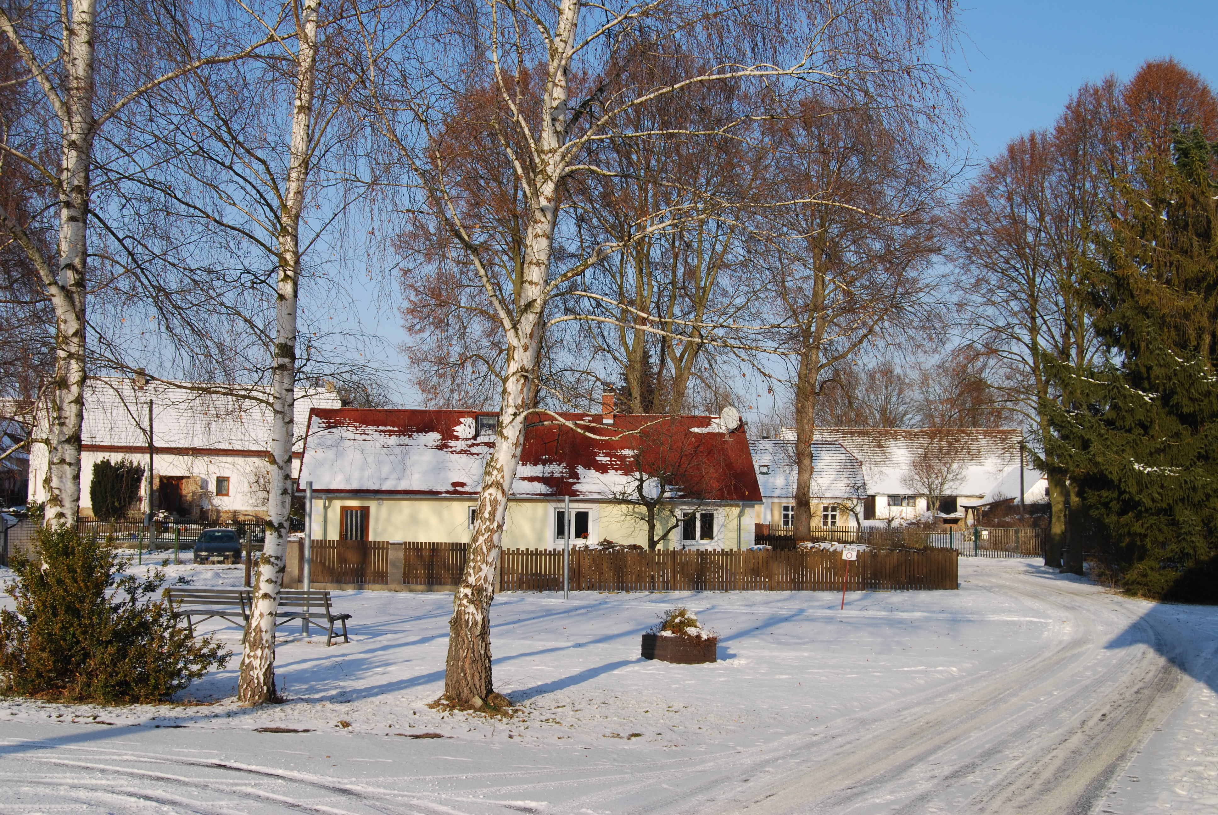 Pohled na část obce. Minice (okres Písek). Česká republika.